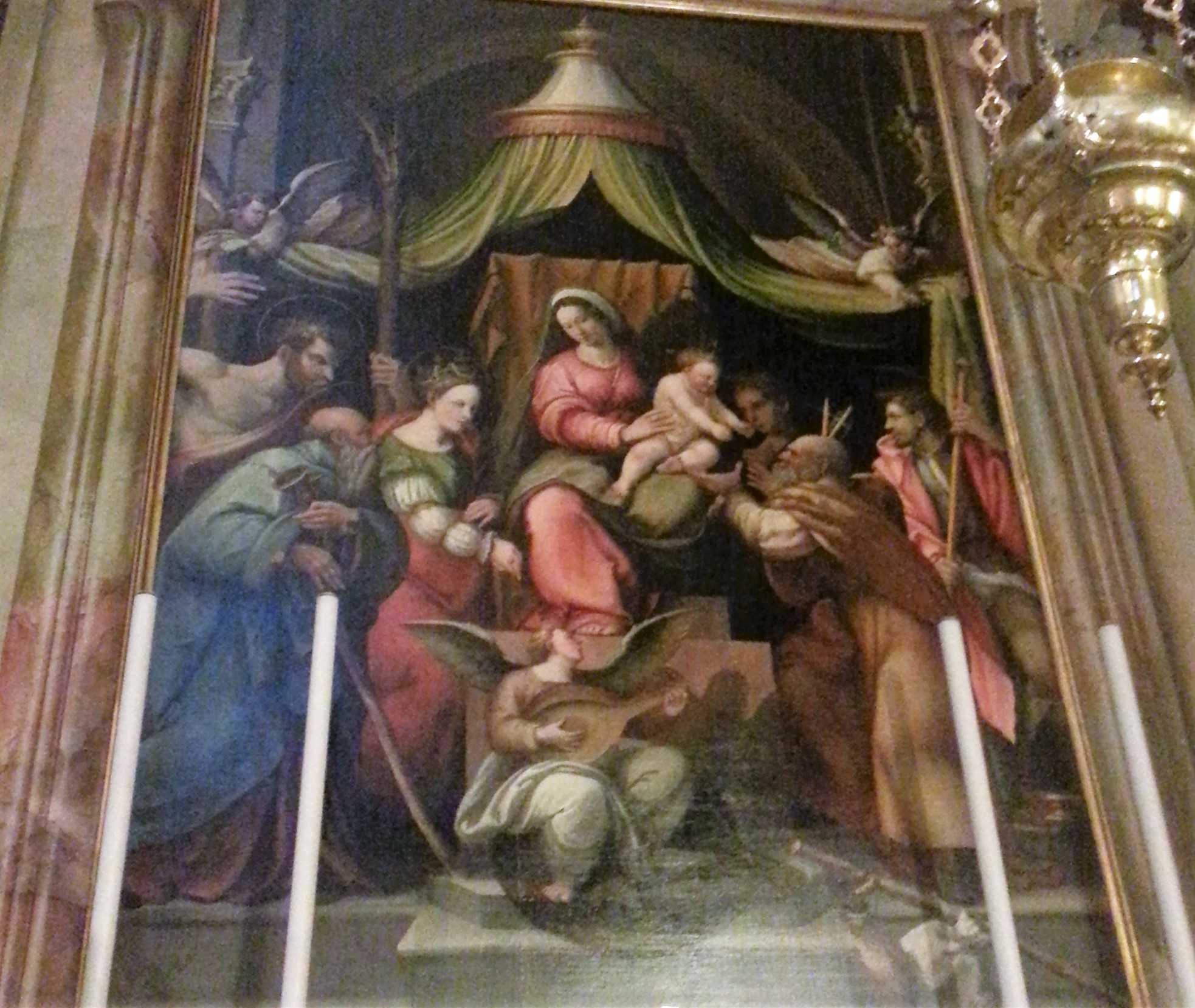 Madonna e Santi tra qui San Rocco opera del secolo XVI di Lucano da Imola